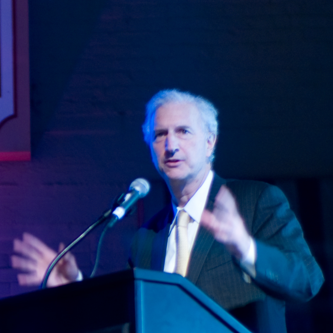 Ira Magaziner 2007